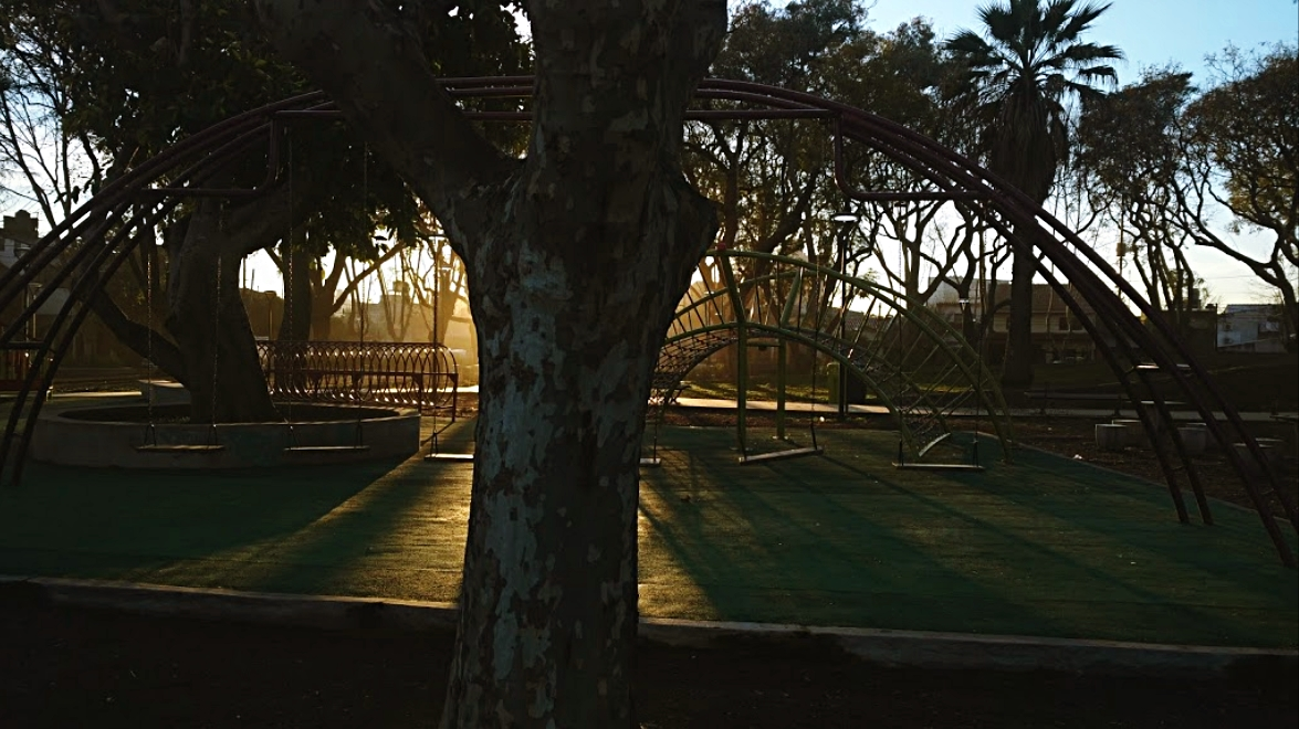 Plaza Giorello, desde la calle Cueli, fotografia por Nacho Fabrega